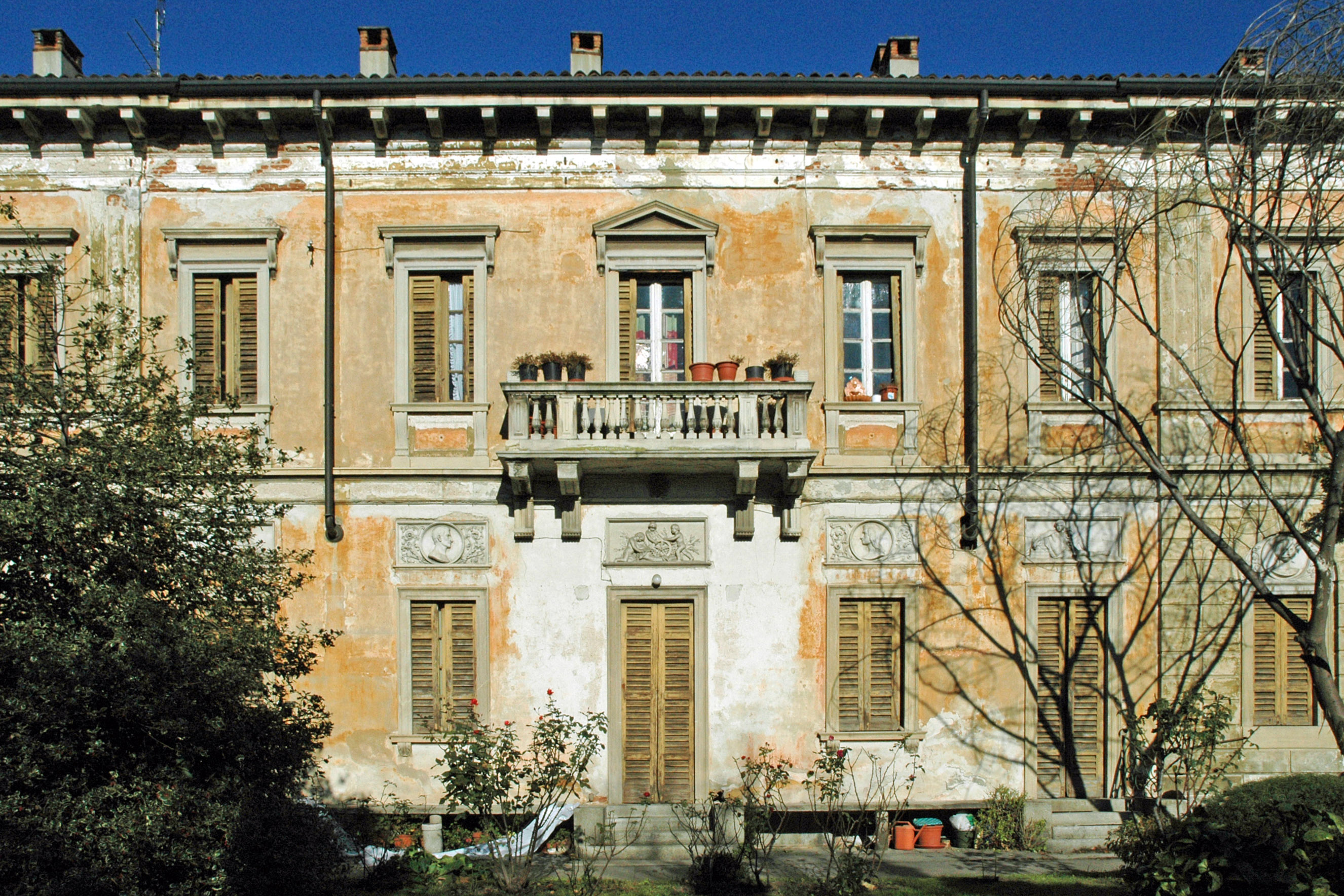 Villa Radetsky This is a photo of a monument which is part of cultural heritage of Italy.